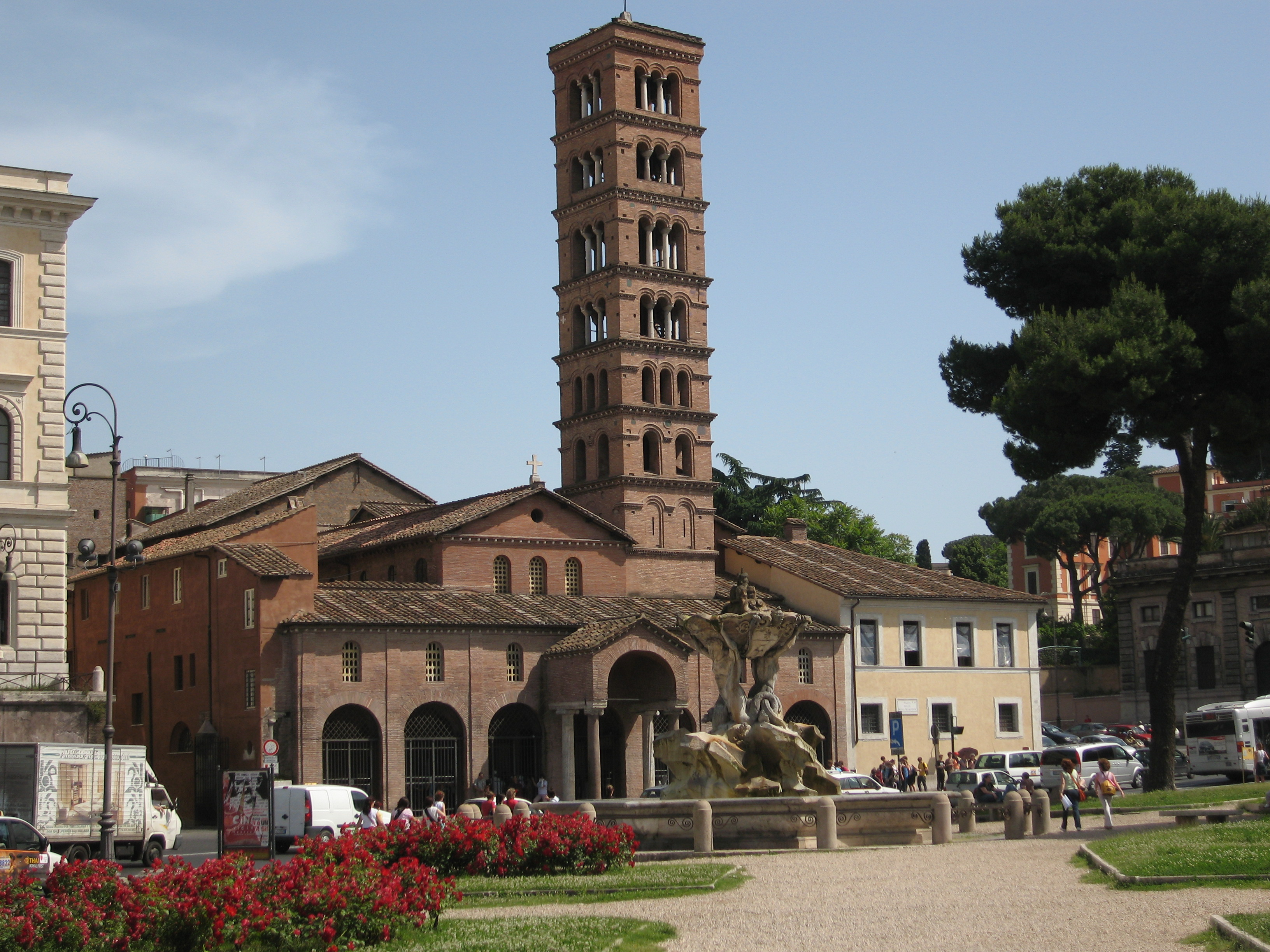 Santa Maria in Cosmedin, Rione XII Ripa, Roma, Lazio, Italy